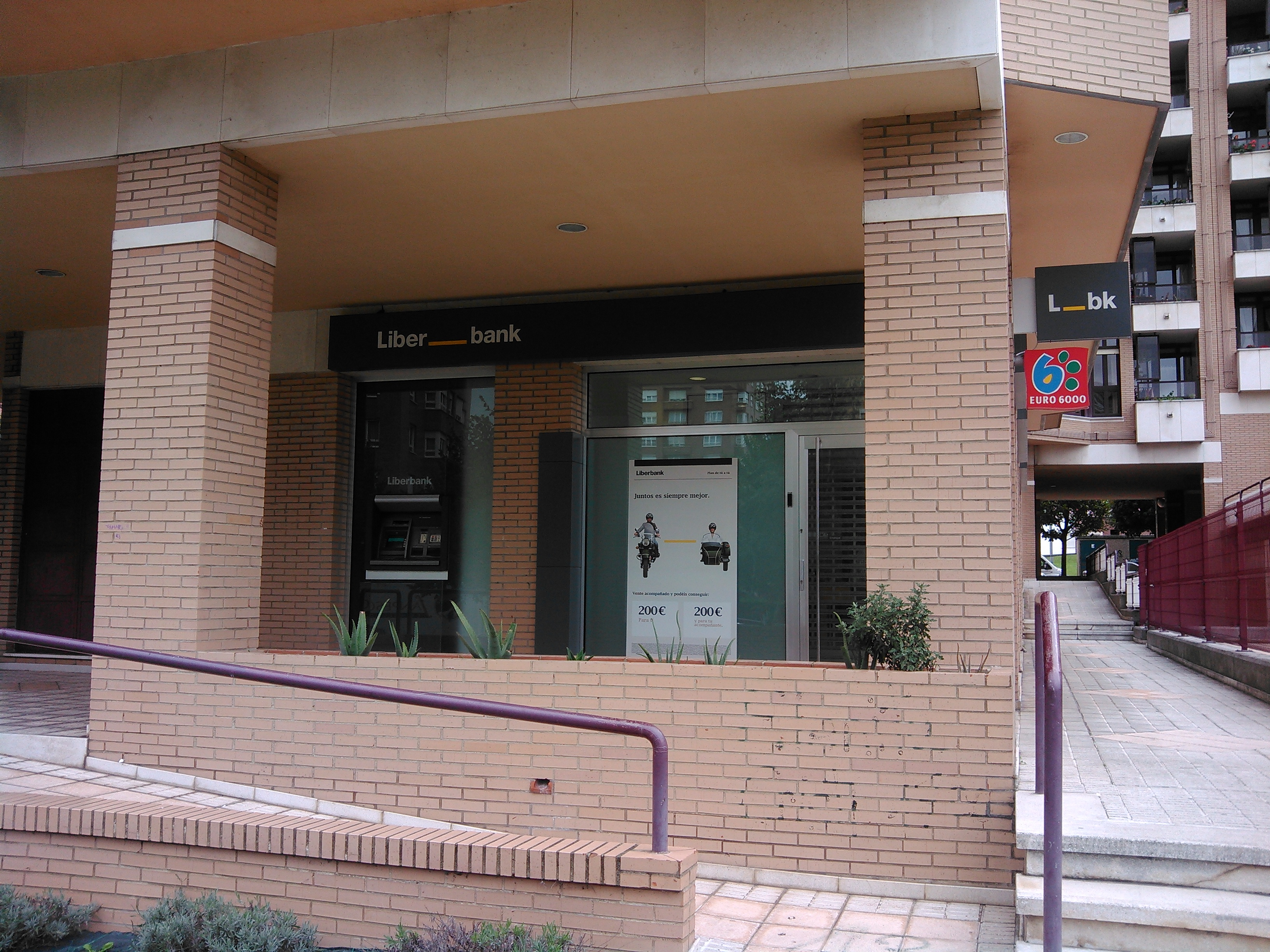 Oficina de Liberbank en el barrio de Montevil de Gijón.